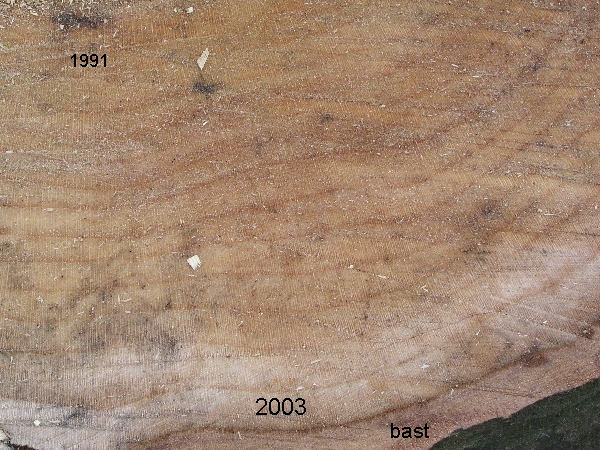 jaarringen in een omgezaagde plataan, eigen foto E van Herk